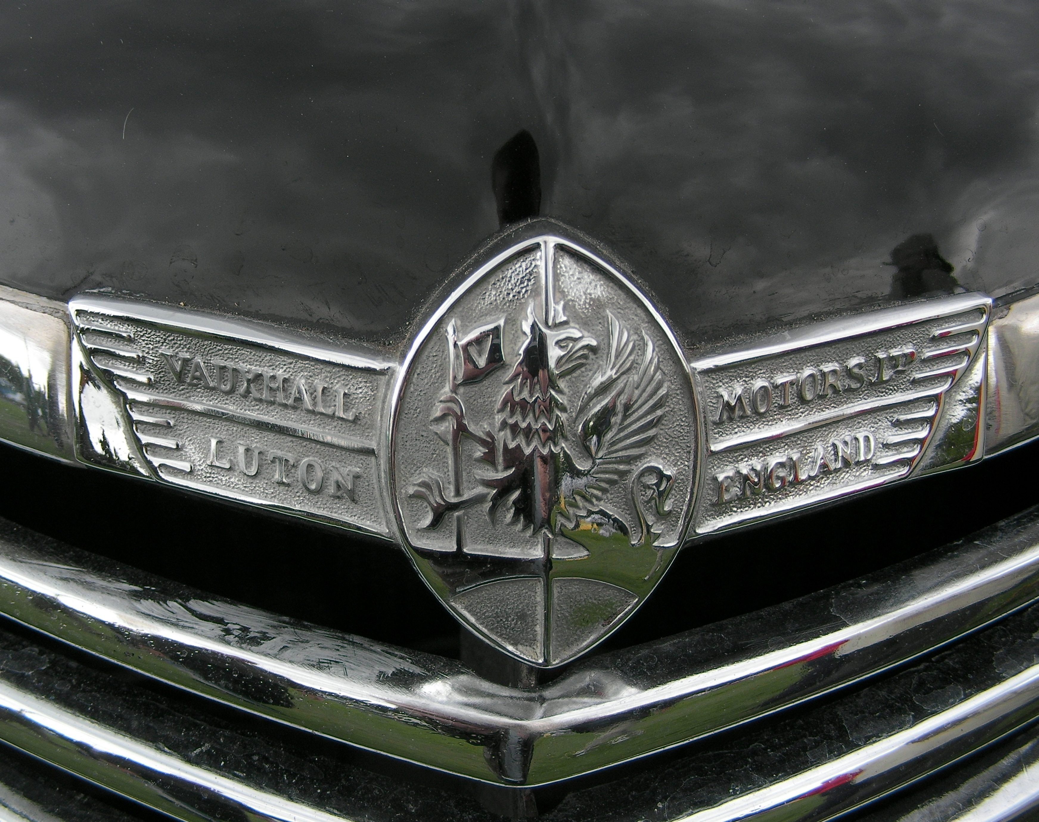 Vauxhall badge